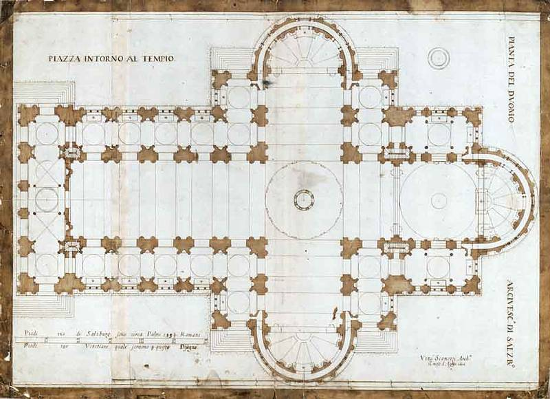 Grundriss des (in dieser Form nicht errichteten) Salzburger Domes von Vincenzo Scamozzi; Salzburg-Museum